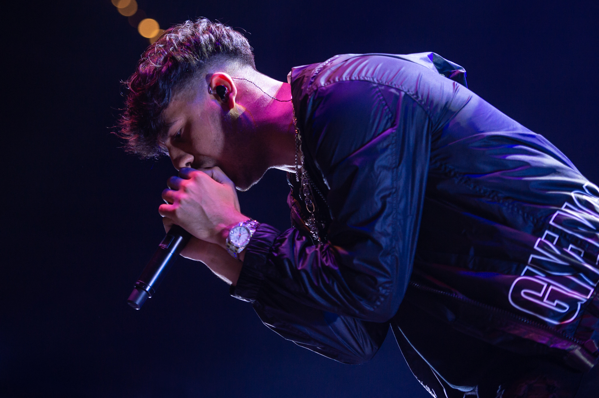 ARGO-Konzerte,Alternarena,Festival,Konzert,Livekonzert,Livemusik,Musik,RiP,Rock im Park 2018,Ufo361